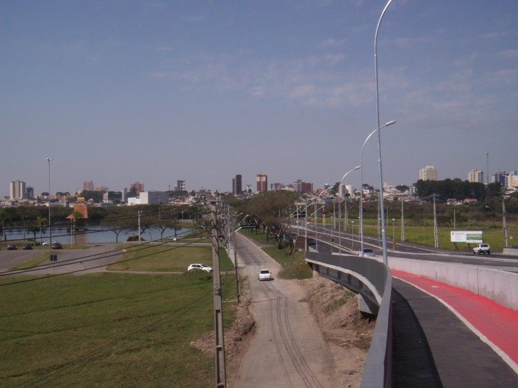 Vista do centro de São José dos Pinhais, visto do Parque Náutico de Curitiba